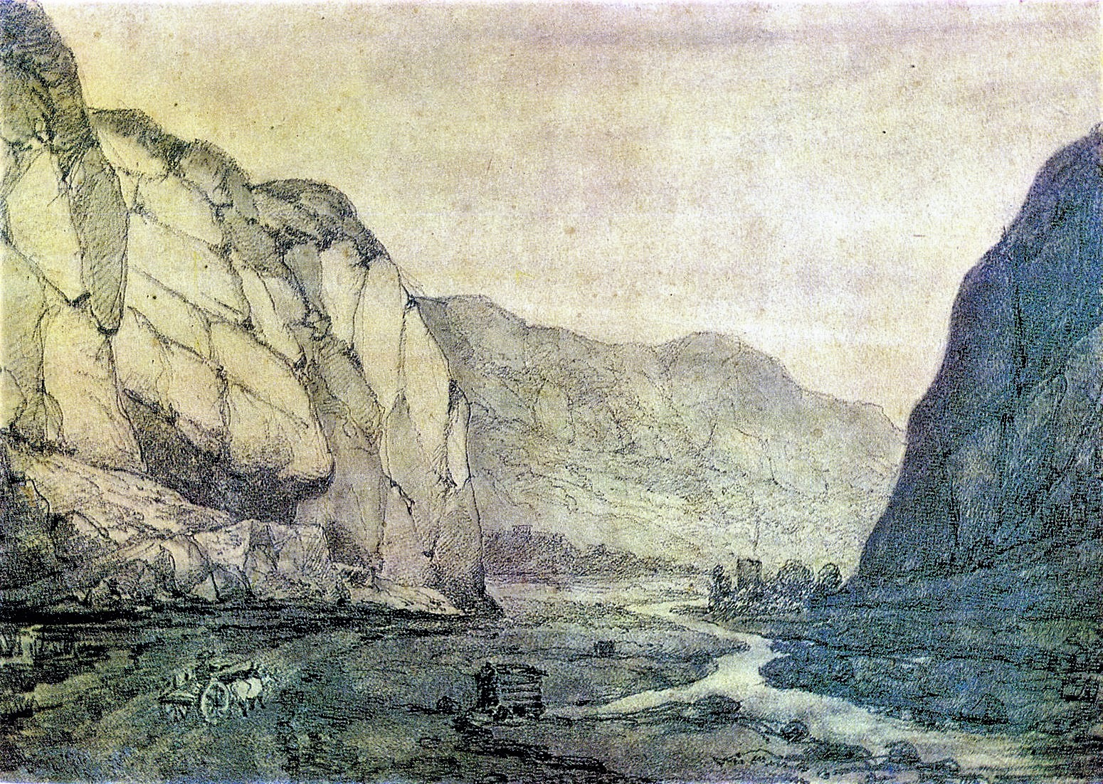 La gola del Dar'jal vicino alla stazione di posta